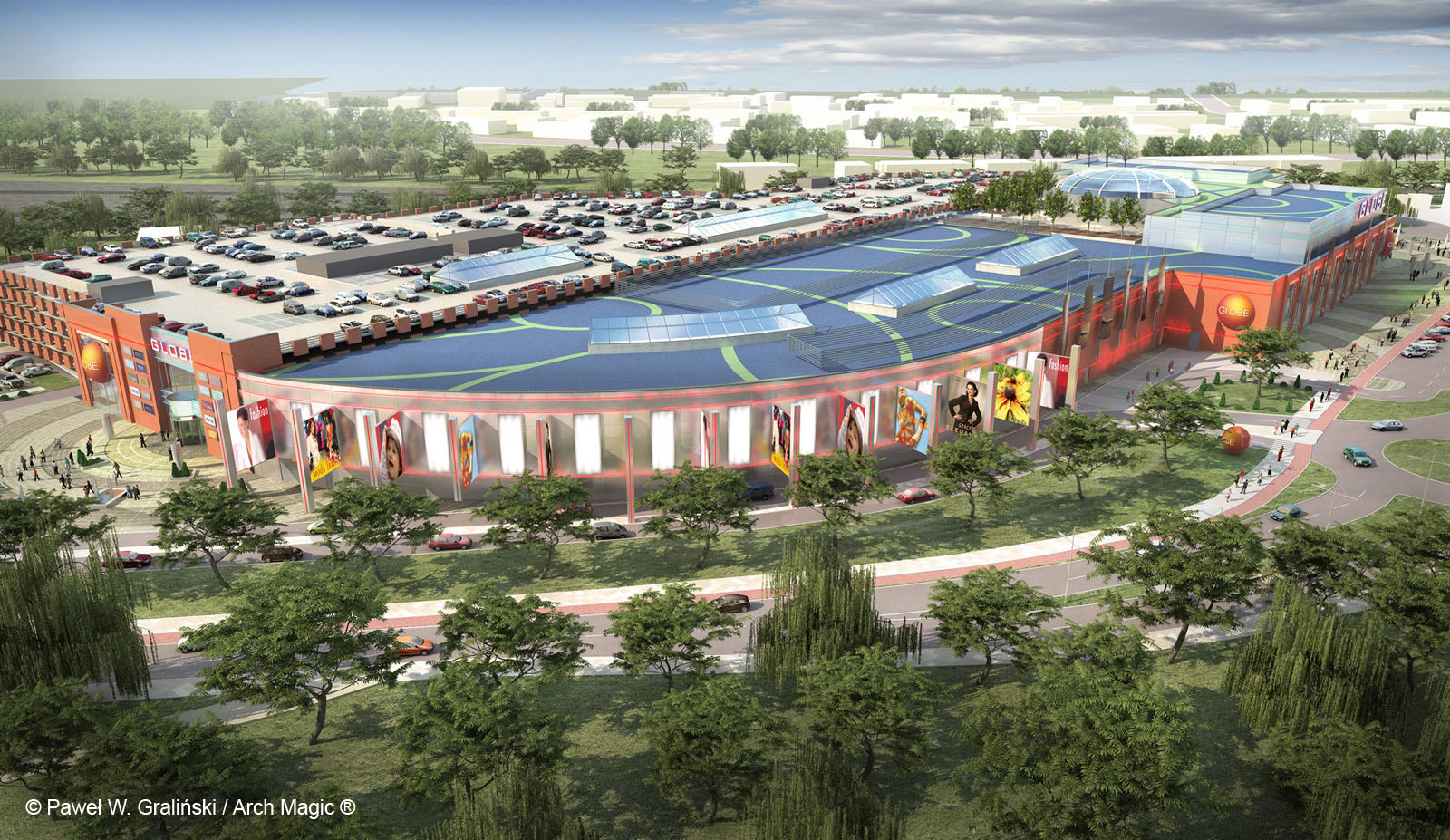 projekt Focus Mall Piła